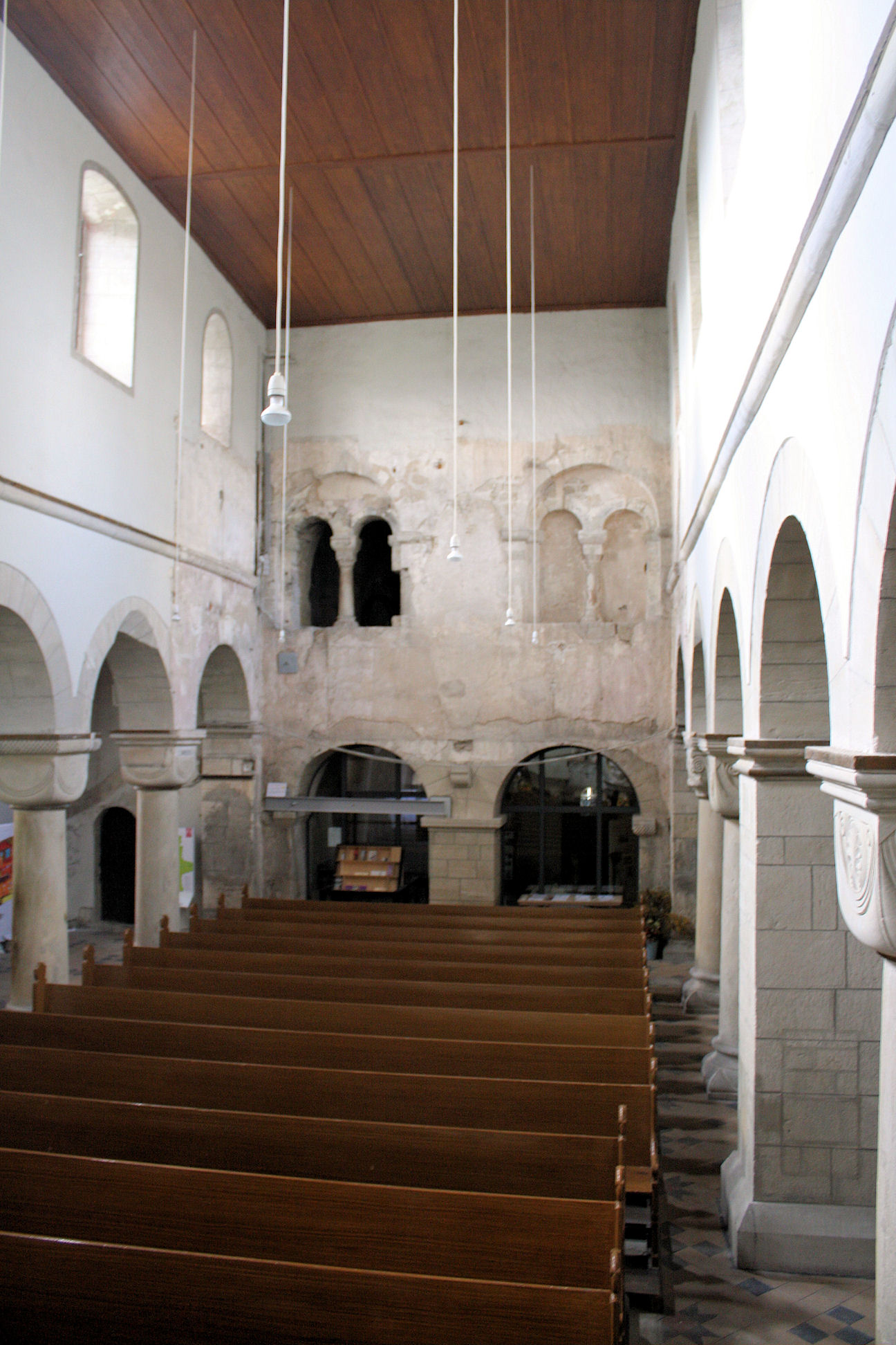 Markgraf Ger gründete um 950 ein Benediktinerkloster, das er 959/61 in ein Damenstift umwandelte und mit seinen Gütern dem ebenfalls von ihm gegründeten Stift in Gernrode unterstellte. Die ottonische Stiftskirche ist teilweise erhalten und zählt zu den ältesten geistlichen Stiftungen. Lange wurde angenommen, dass es sich bei dem Bauwerk um eine später errichtete Kirche von 1170 handelt. Untersuchungsergebnisse von 2007 haben dies auf einen Irrtum in der Interpretation einer Urkunde deutlich gemacht. Mit sehr großer Wahrscheinlichkeit handelt es sich um die Kirche aus dem Jahr 950. Im 13. Jahrhundert erfolgten Veränderungen am Chor und am Westbau. Im 18. Jahrhundert wurden viele mittelalterlichen Schäden beseitigt, wobei die Nebenapsiden abgerissen und die Querhausarme zu Seitenschiffsteilen verkürzt wurden. The nave of St Cyriakus Church. Seit November 2007 ist, nach über 400 Jahren, das Westwerk mit der Berühmten (aber leider bisher nicht sichtbaren) Nonnenempore freigelegt und ohne Rüstungen besehbar. Strasse der Romanik Die Stiftskirche St. Cyriakus ist Mitglied in der Straße der Romanik. Sachsen-Anhalt Tourist